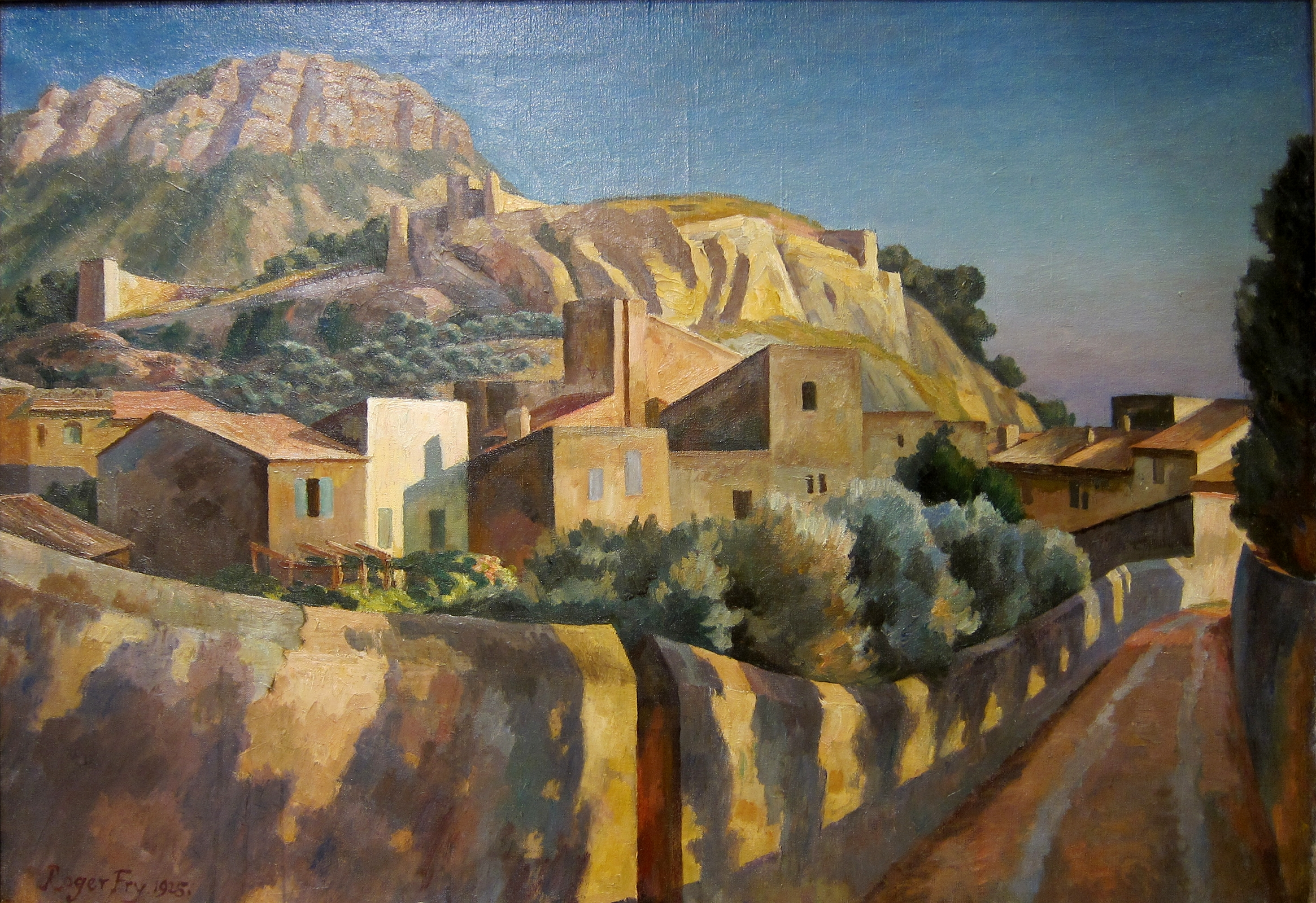 «Vue de Cassis» de Roger Fry (1925) prêté par le musée d'Orsay pour l'exposition Bloomsbury au musée d'art et d'industrie de Roubaix (Nord).